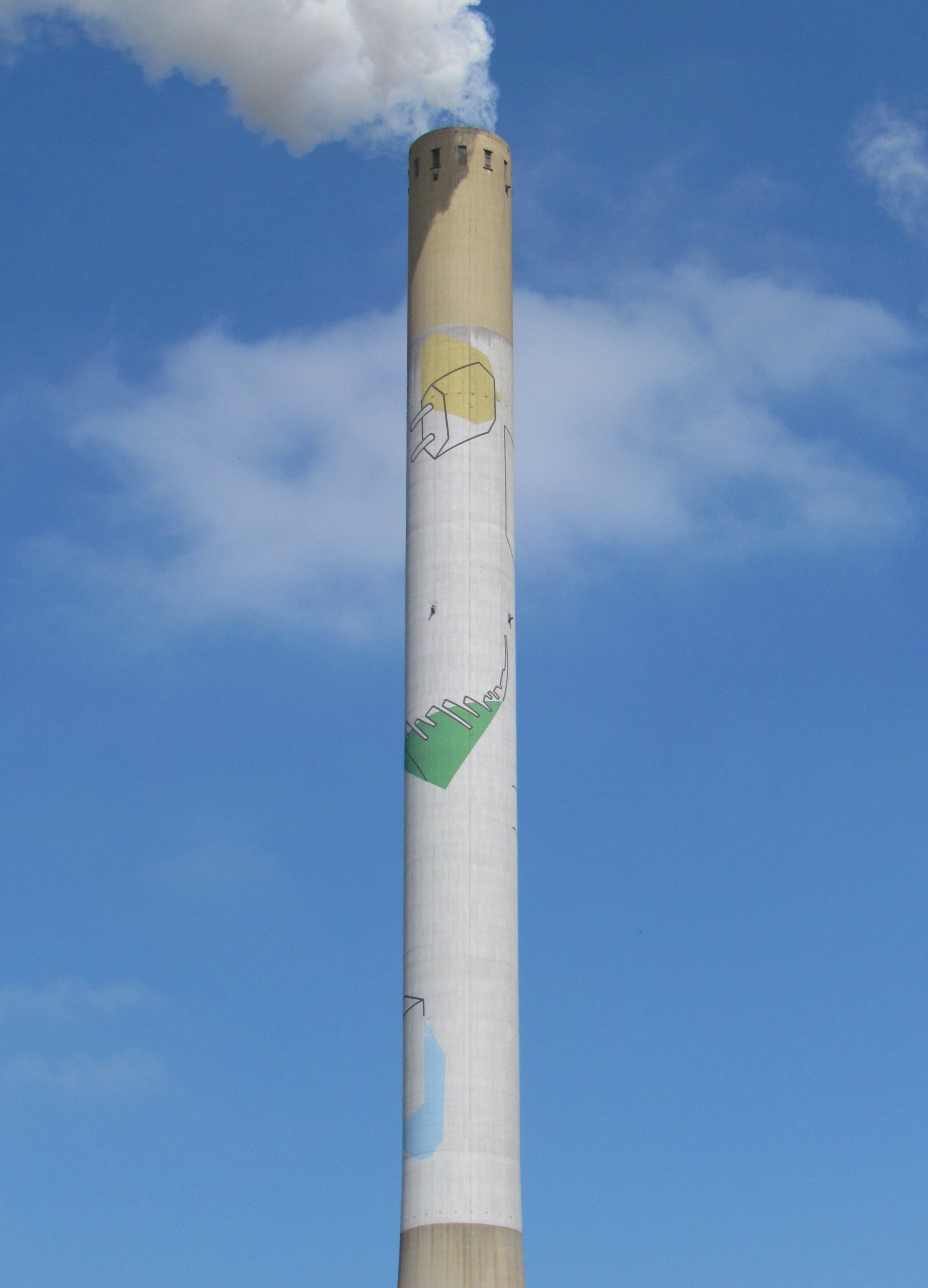 Schoorsteen van de Elektriciteitscentrale Gelderland in Nijmegen (NL} met schilderingen van de plaatselijke kunstenares Corrie Kuijs